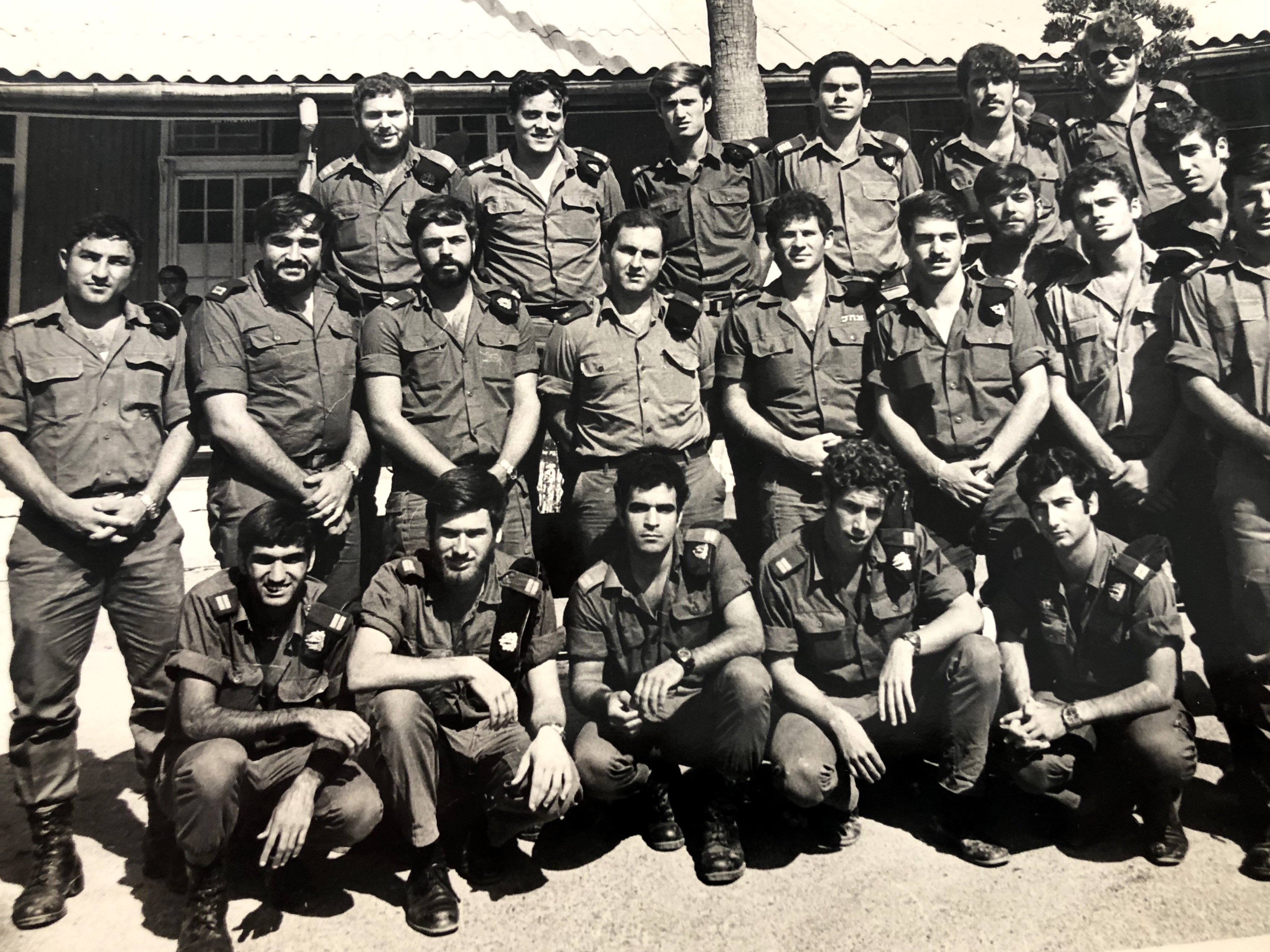 קורס קציני גנ"ק ונשק עם מפקד ביה"ס משה אורון במרכז רונן שני מימין 1974